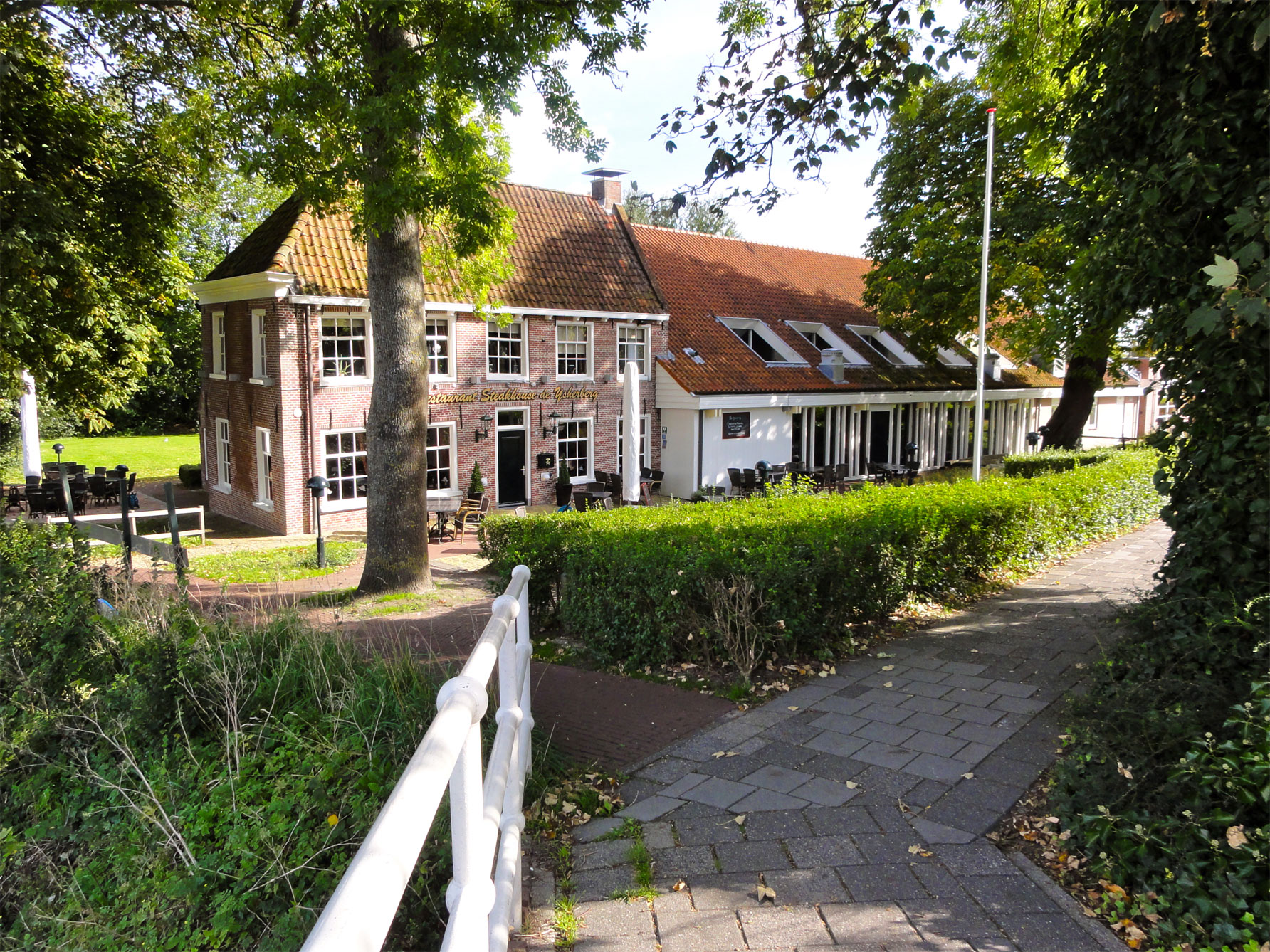 Harddraversdijk 1 Dokkum, rijksmonument